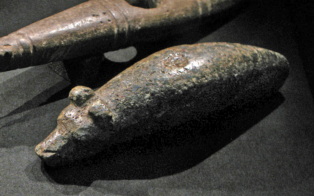 Paltamon Autioniemestä löydetty kivikautinen karhunpäänuija. Kansallismuseo.